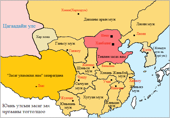 Монгол: Юань улсын засаг захиргааны тогтолцоо